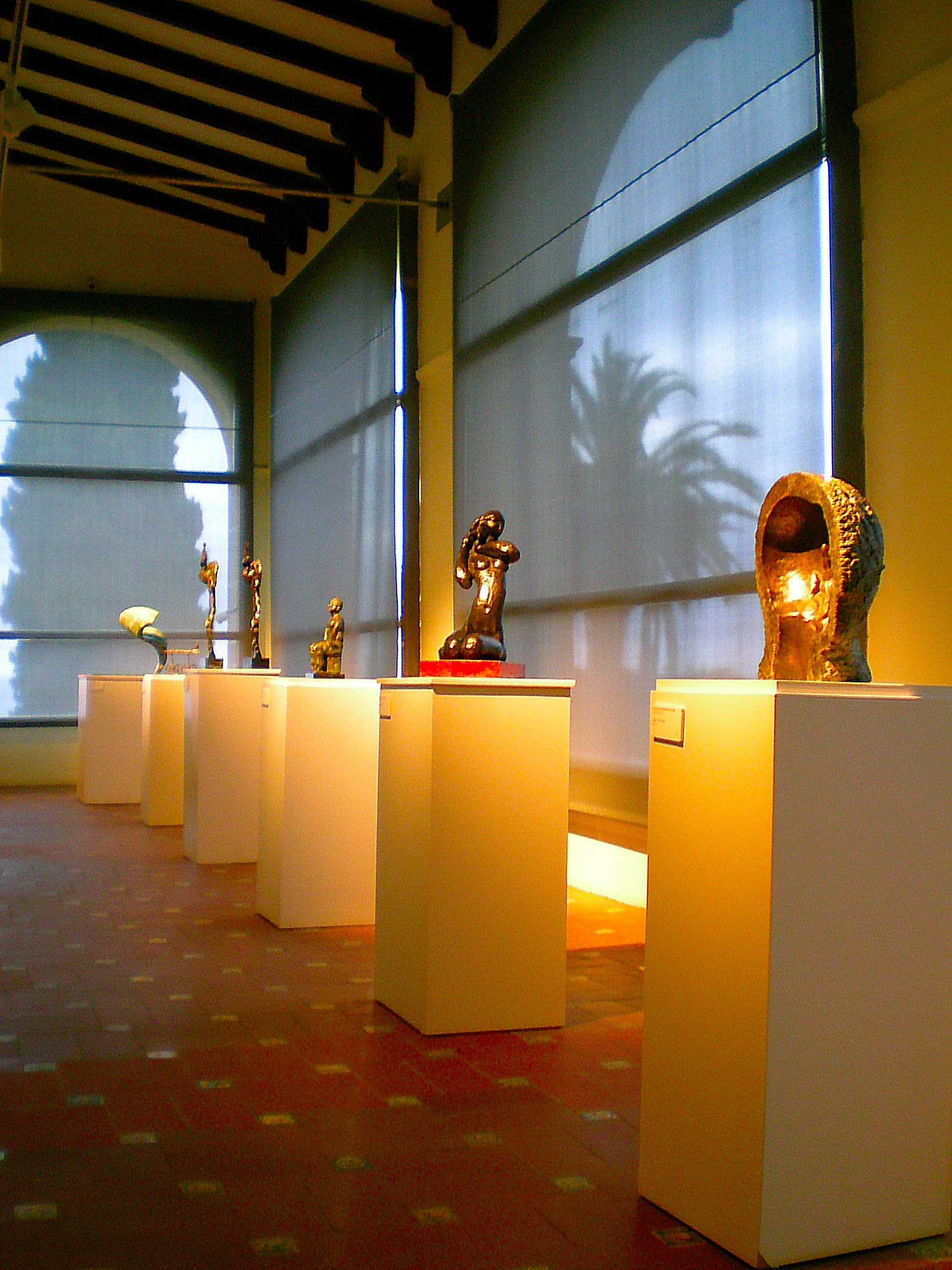 Sala de l'escultura del Museu Arxiu de Sant Andreu de Llavaneres